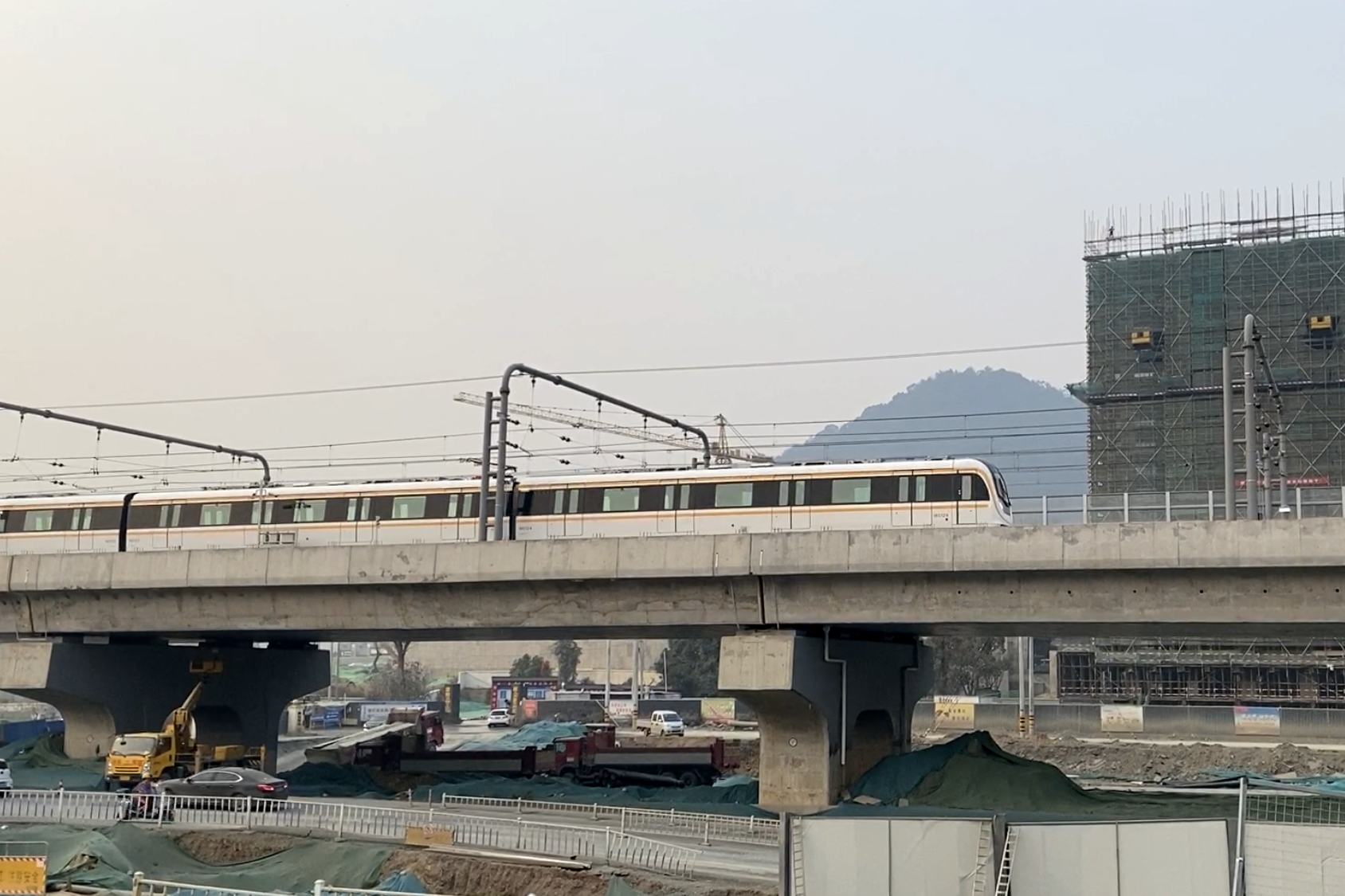 16号线列车离开八百里站